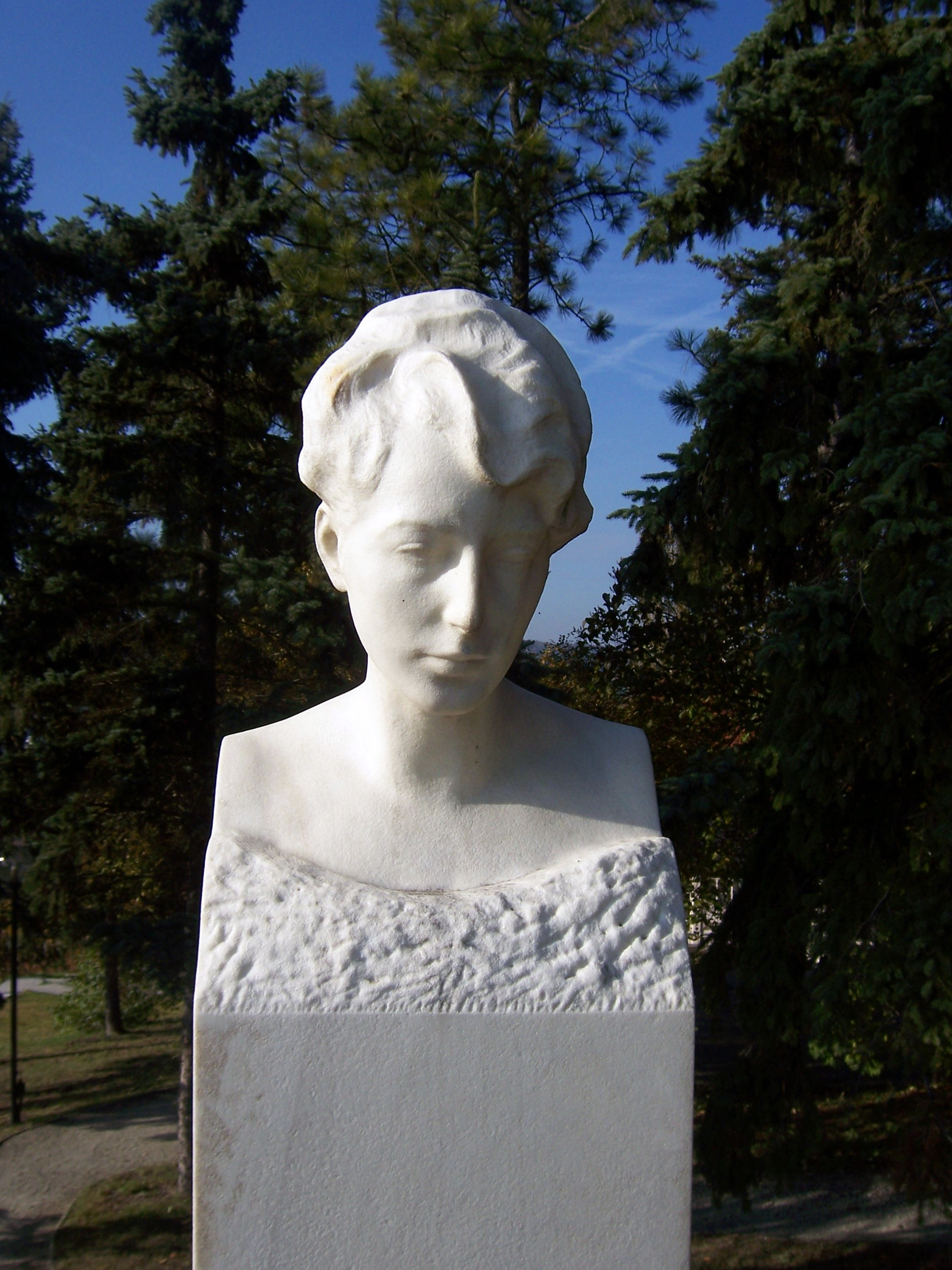 Grabstätte von Gertrud Hartmann, verw. Klinger, geb. Bock, Marmor Detail der Grabmalanlage für Max Klinger in Großjena von Johannes Hartmann, 1921